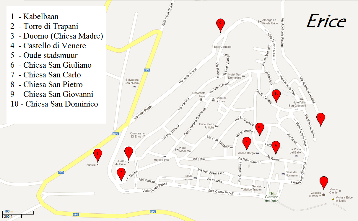 Erice Bezienswaardigheden